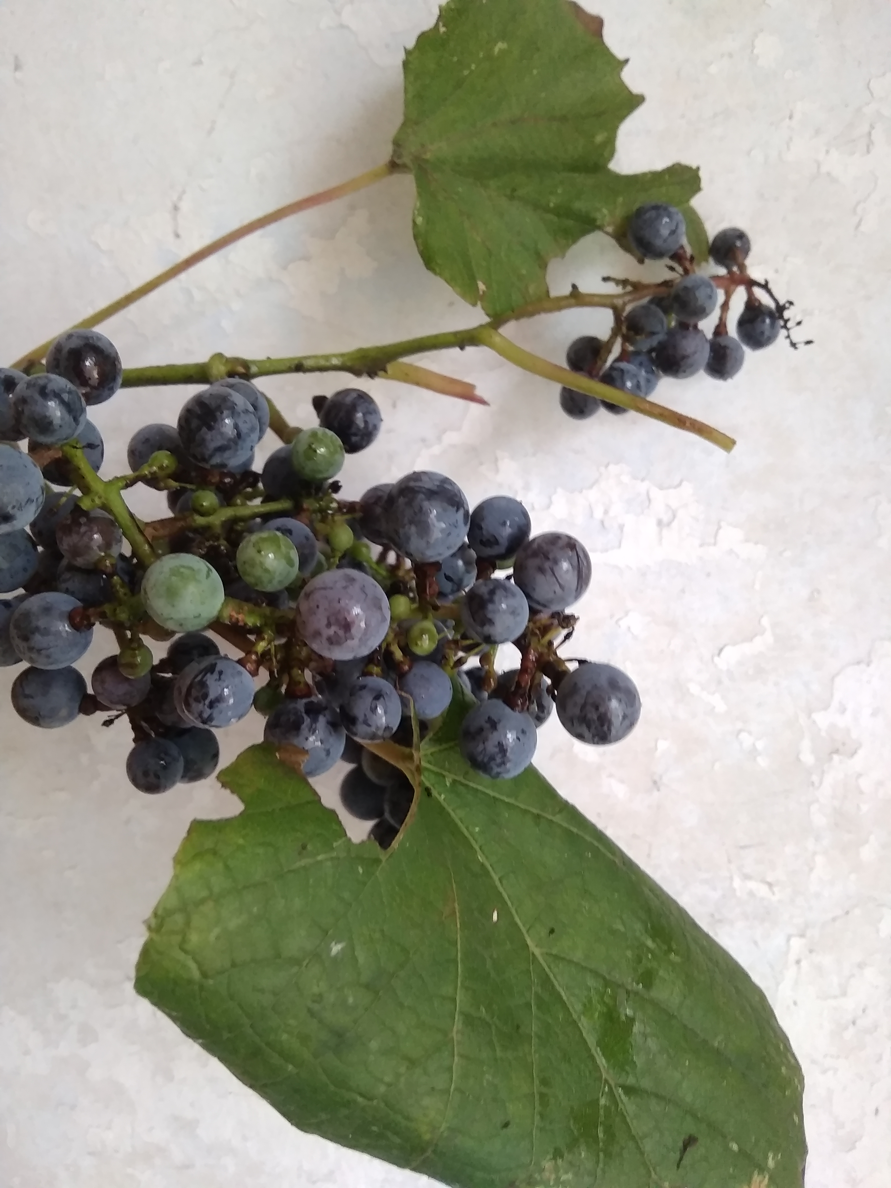 山葡萄，中国吉林省，2019年8月拍摄